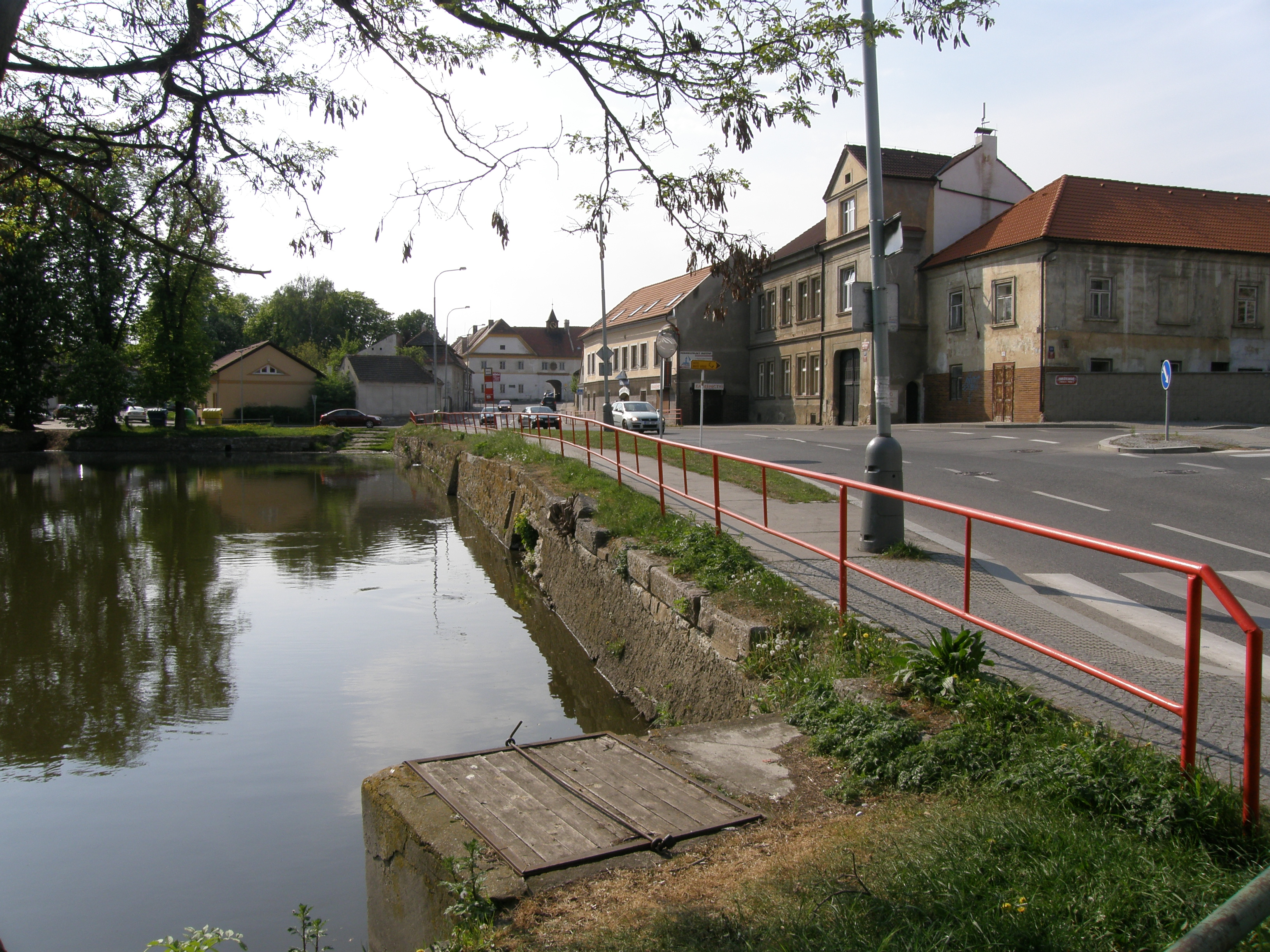 Praha-Jinonice, Butovická a Karlštejnská ulice, bývalá náves s rybníkem, v pozadí zámek.